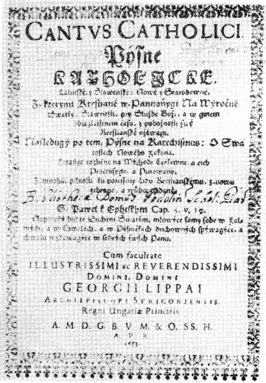 Титульная страница сборника католических песен Canthus Catholici, изданного в Западной Словакии в 1655 году.